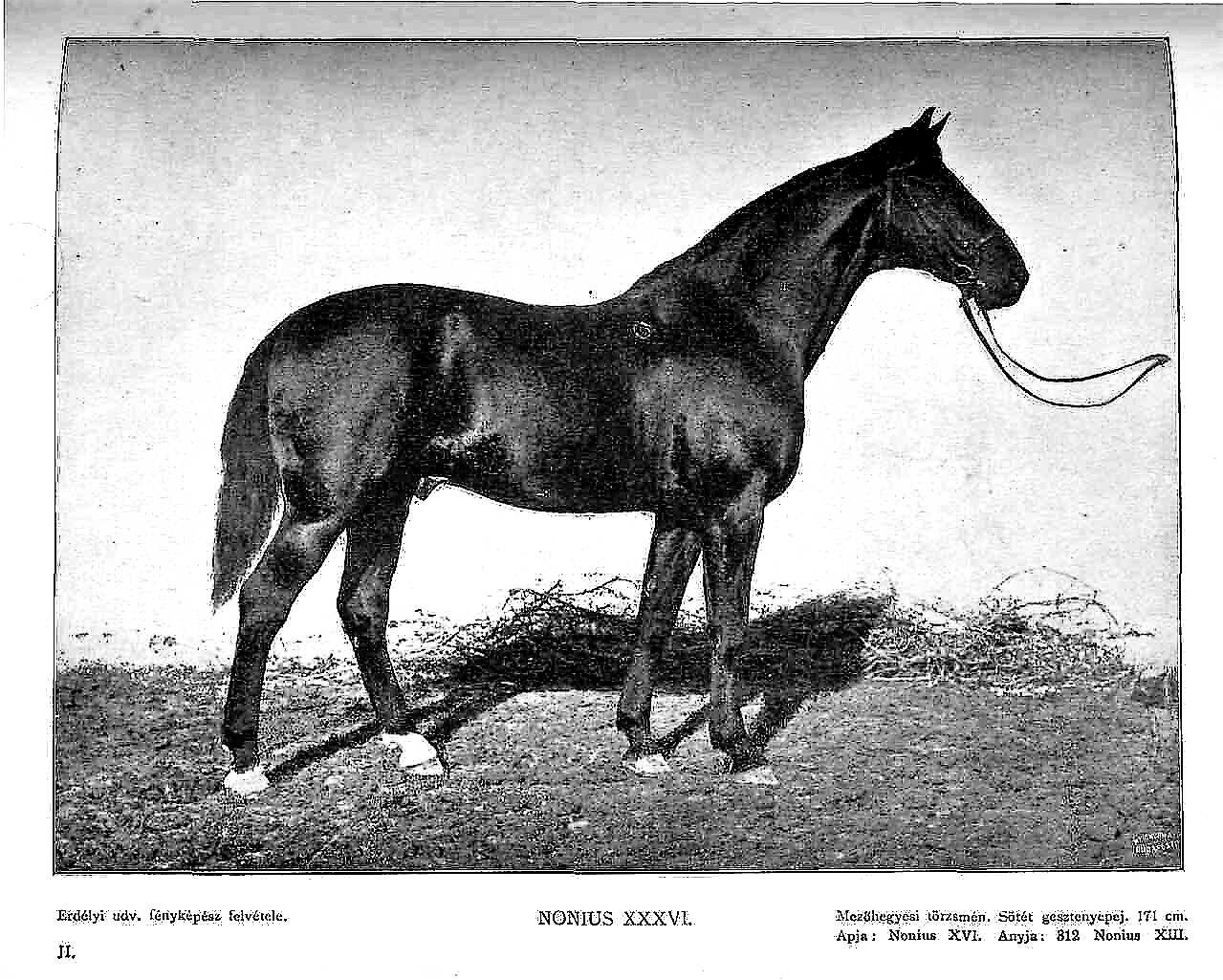 Kovácsy Béla - Monostori Károly: A ló és tenyésztése, 331. oldal Nonius XXXVI.